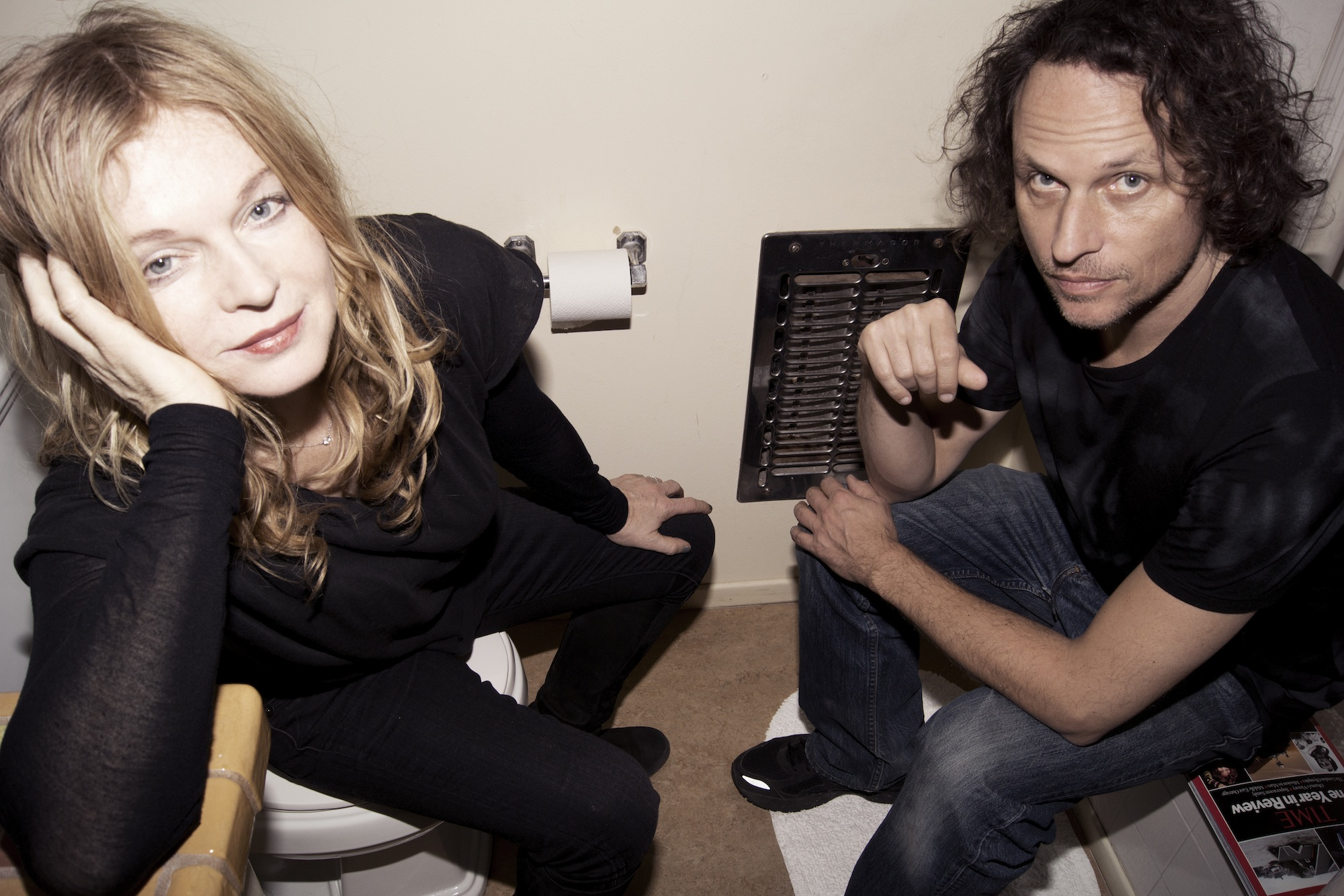 2raumwohnung